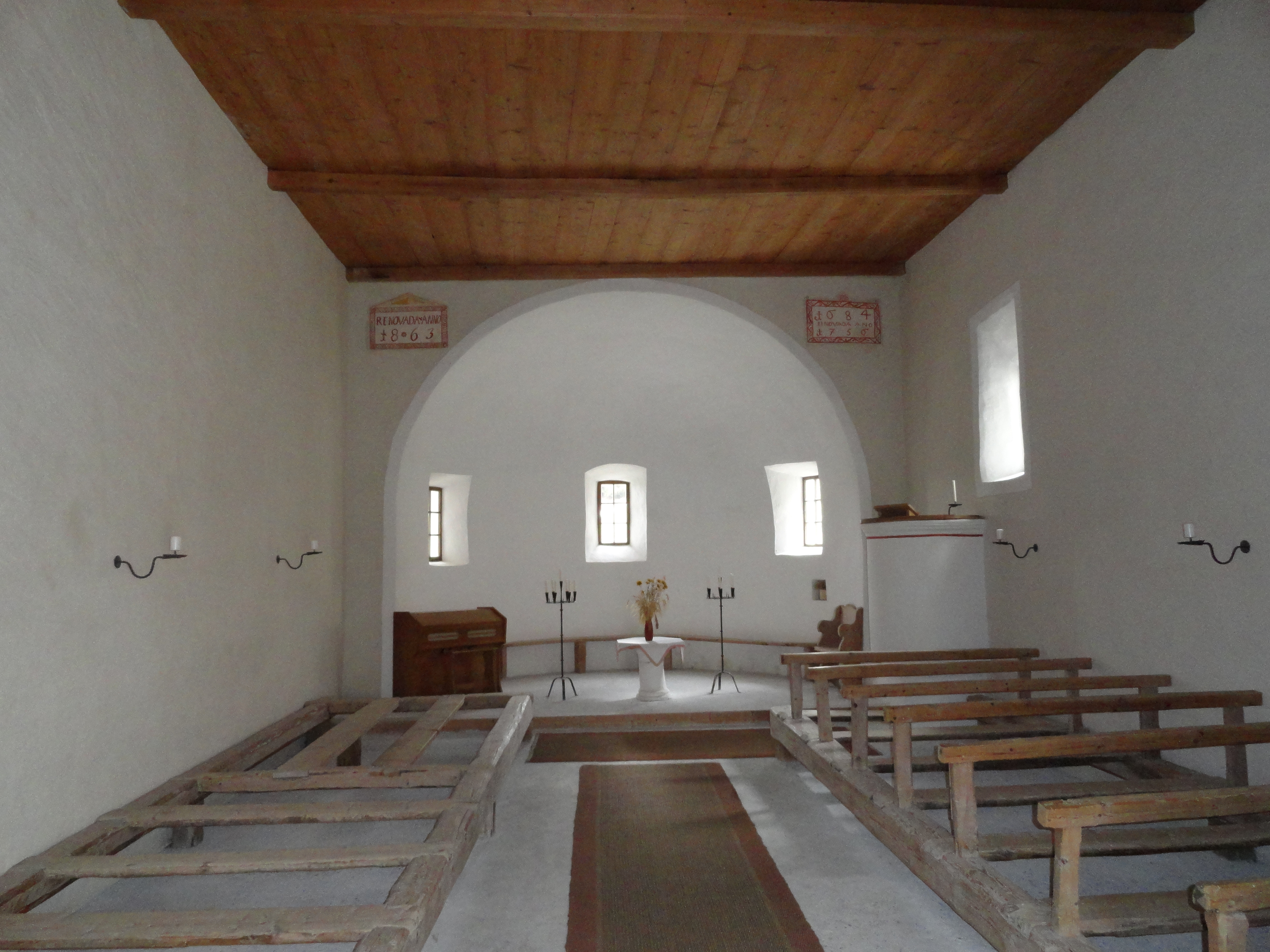 Reformierte Kirche Sur En (Ardez) Innenraum